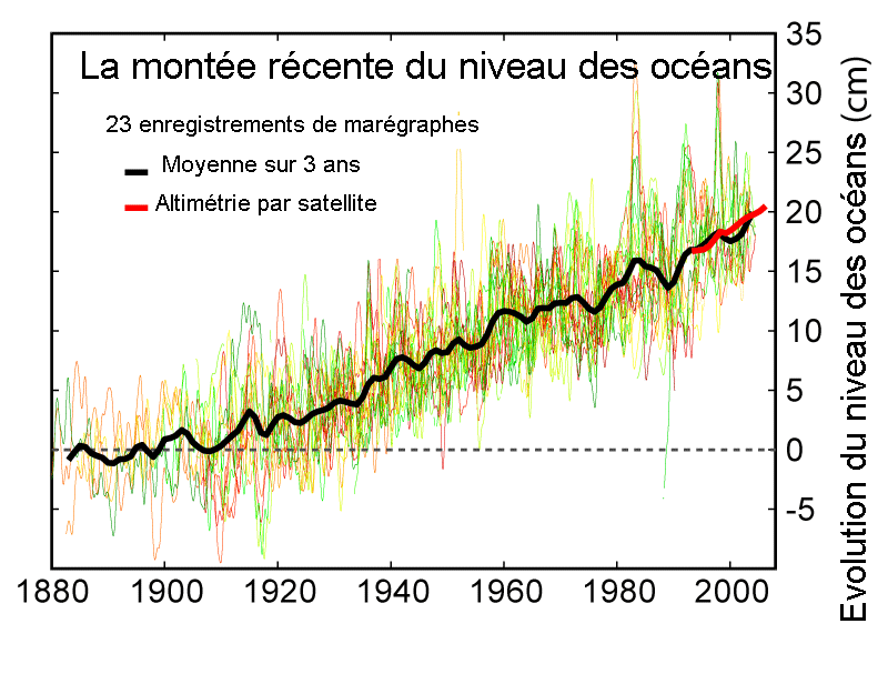 montée des eaux récentes